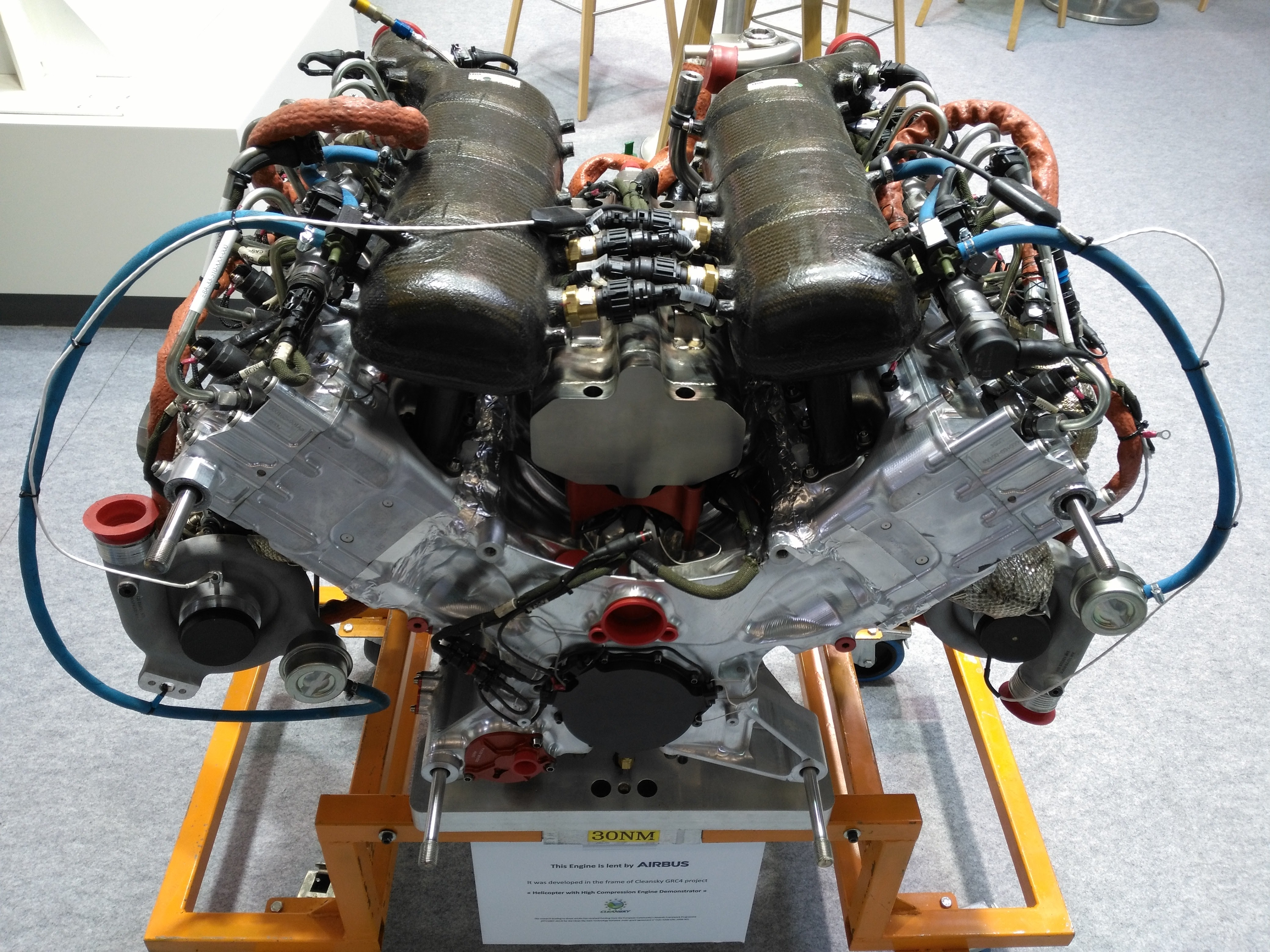 Paris Air Show 2017 mecachrome AE440